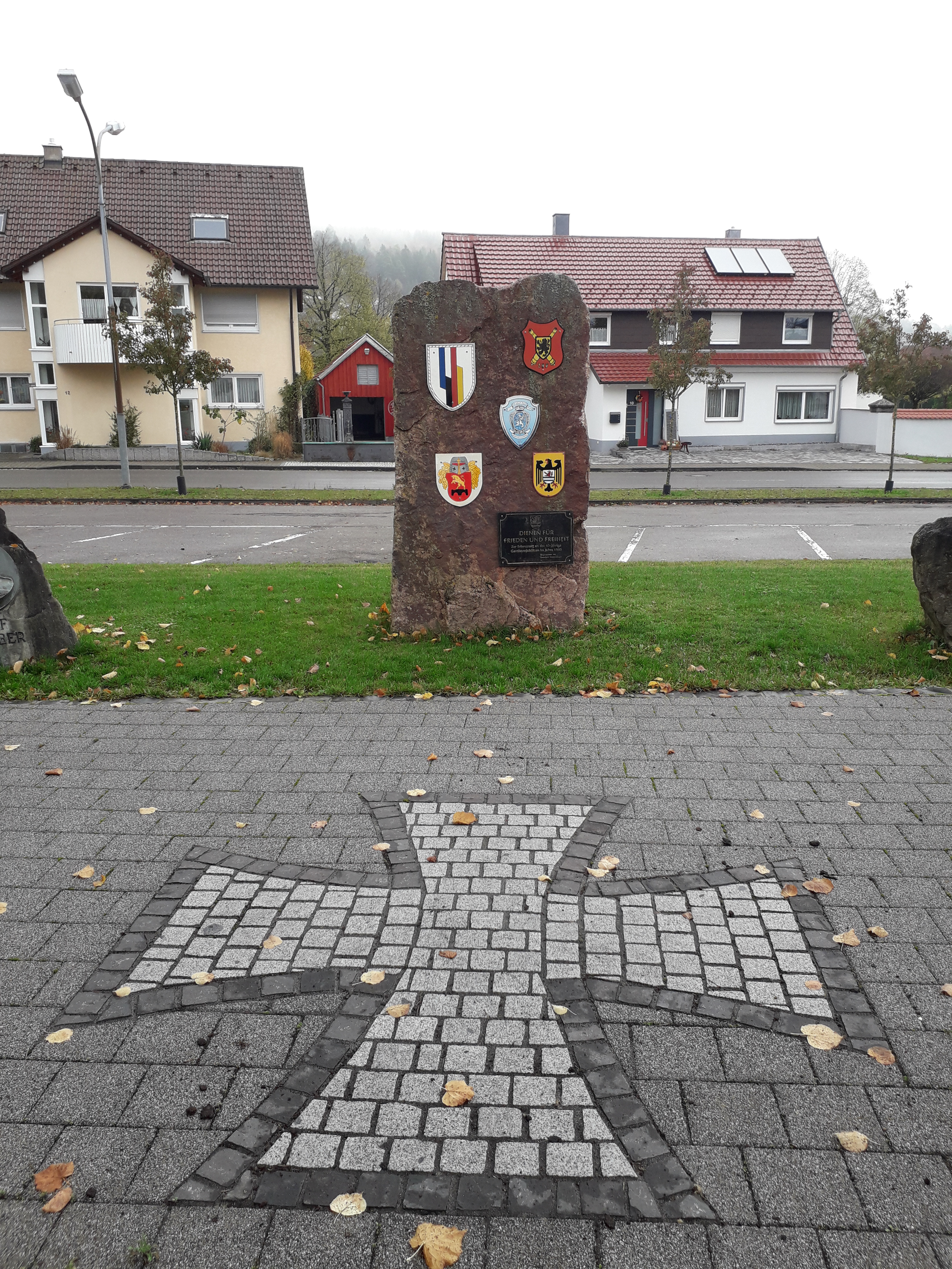 Stèle commémorative de la présence d’unités de la brigade franco-allemande à Immendingen